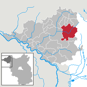 Pritzwalk in Brandenburg (Country) - District Prignitz